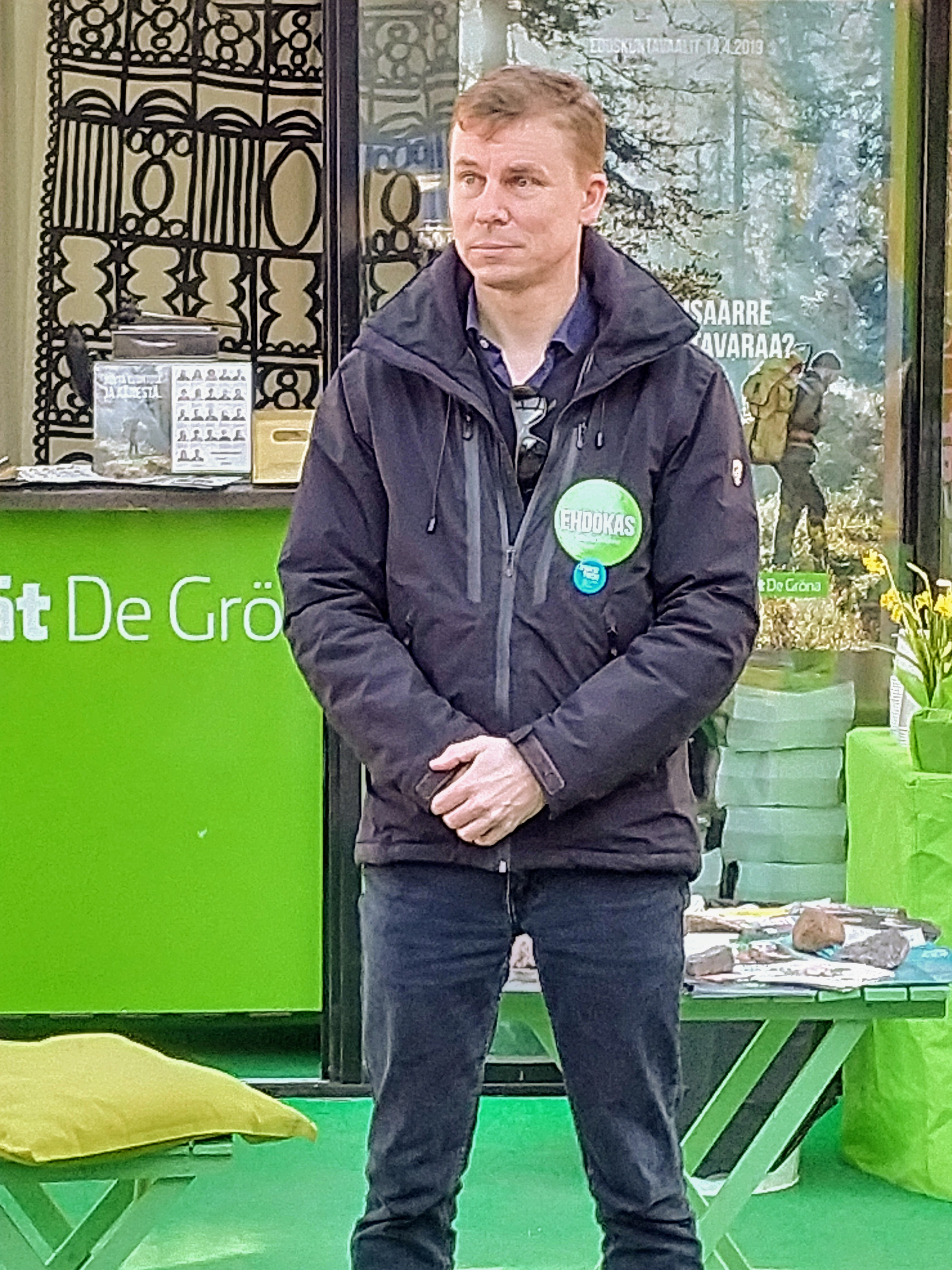 Helsinki Vihreät (puolue) Eduskuntavaalit 2019